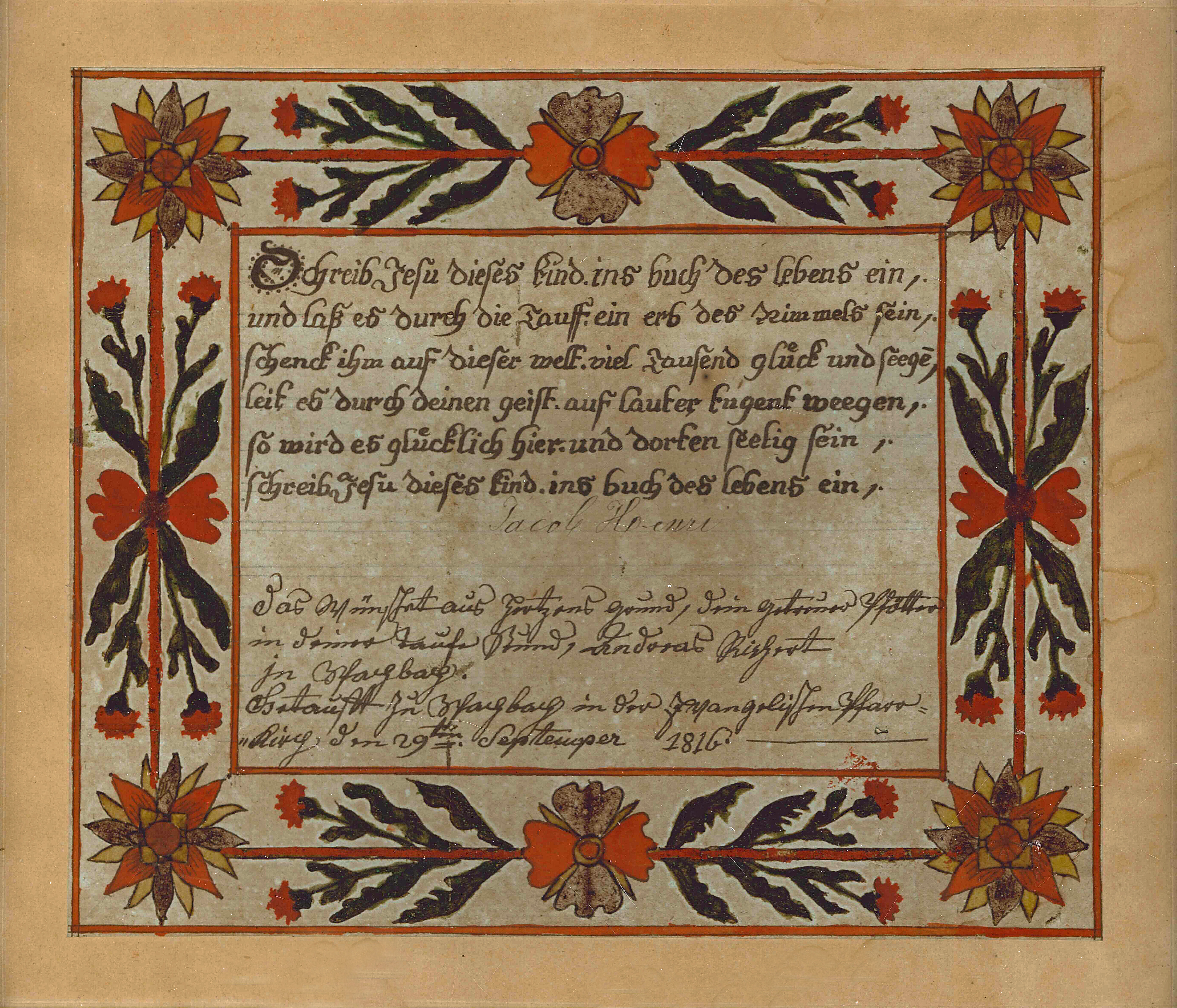 Souhait de baptême protestant alsacien (Goettelbrief). Oberhoffen, 1816. Collection particulière.